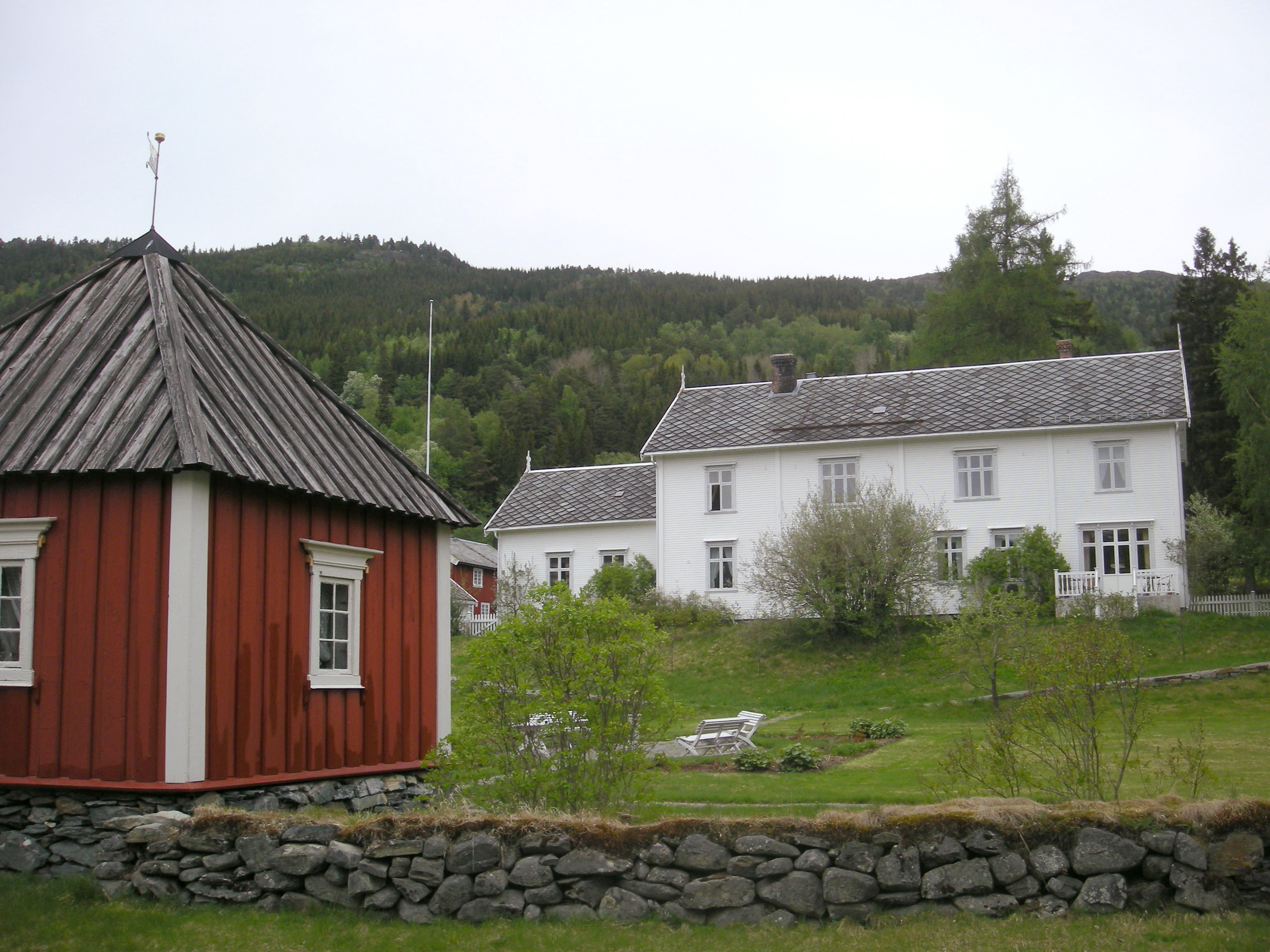 Meldal prestegård